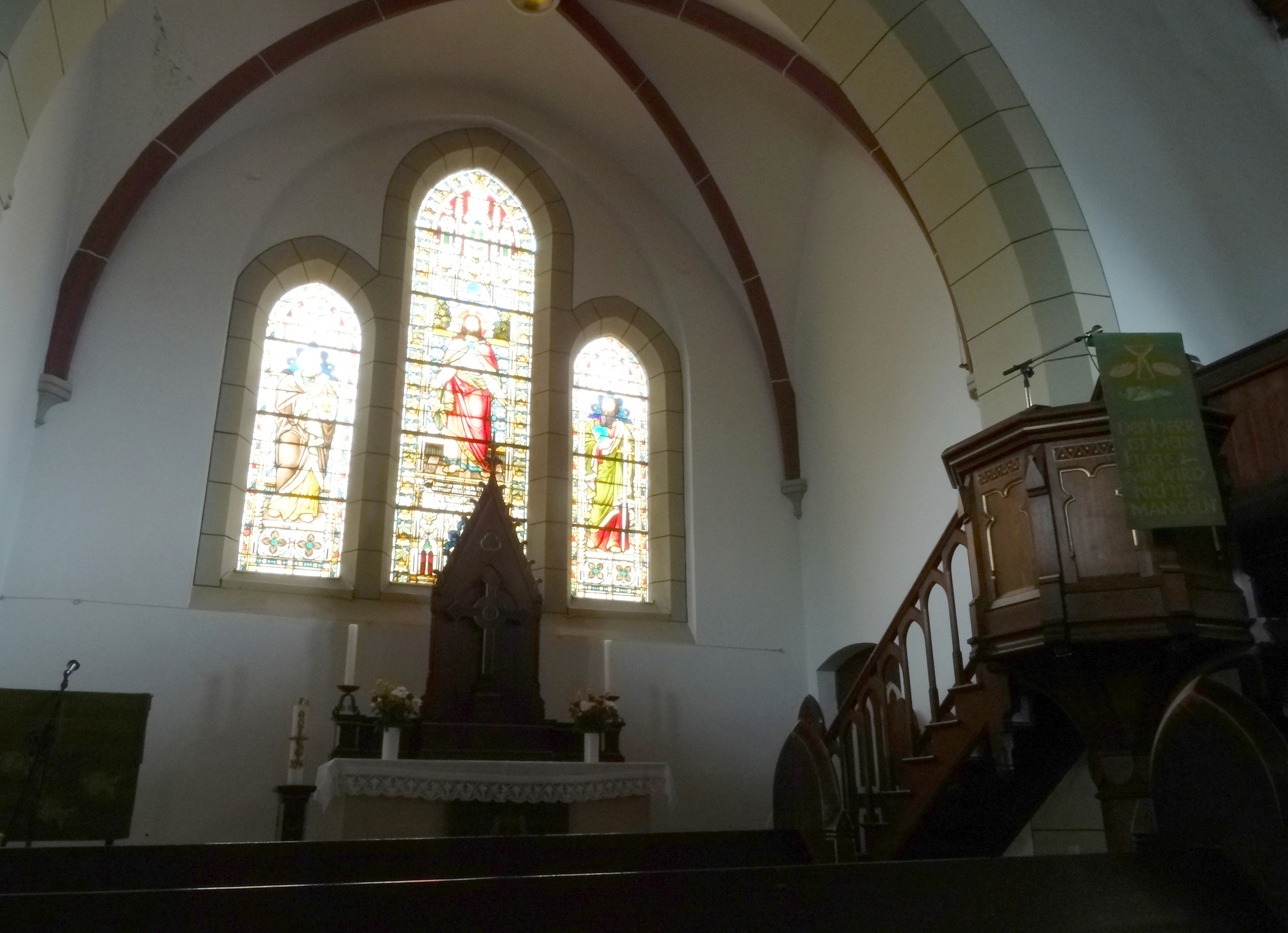 St. Nicolai (Brotterode), Kirchenraum mit eindrucksvollen Altarfenstern